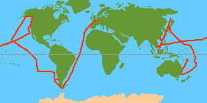 Journey of Jean-François La Perouse 1785 - 1788